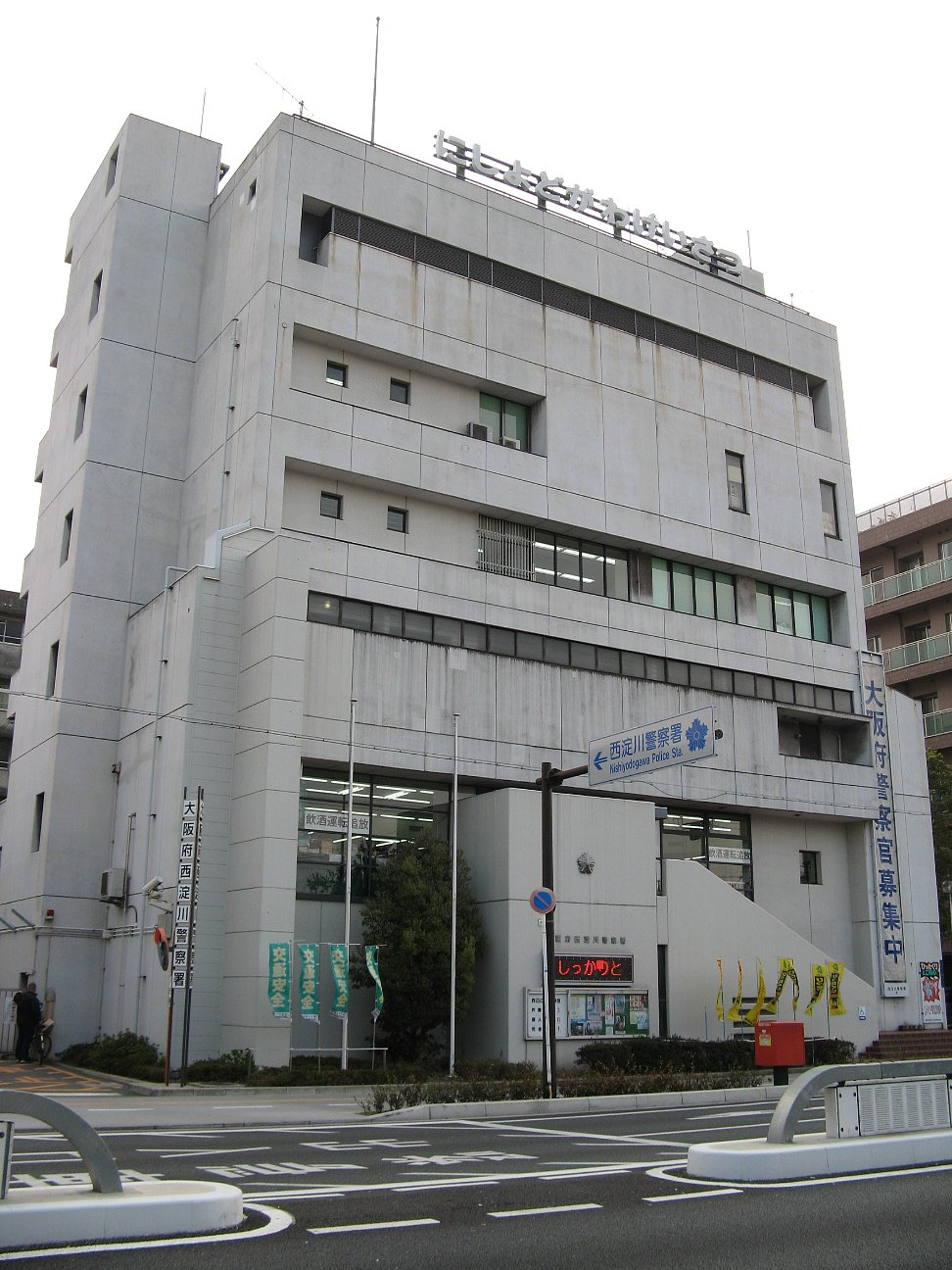 西淀川警察署